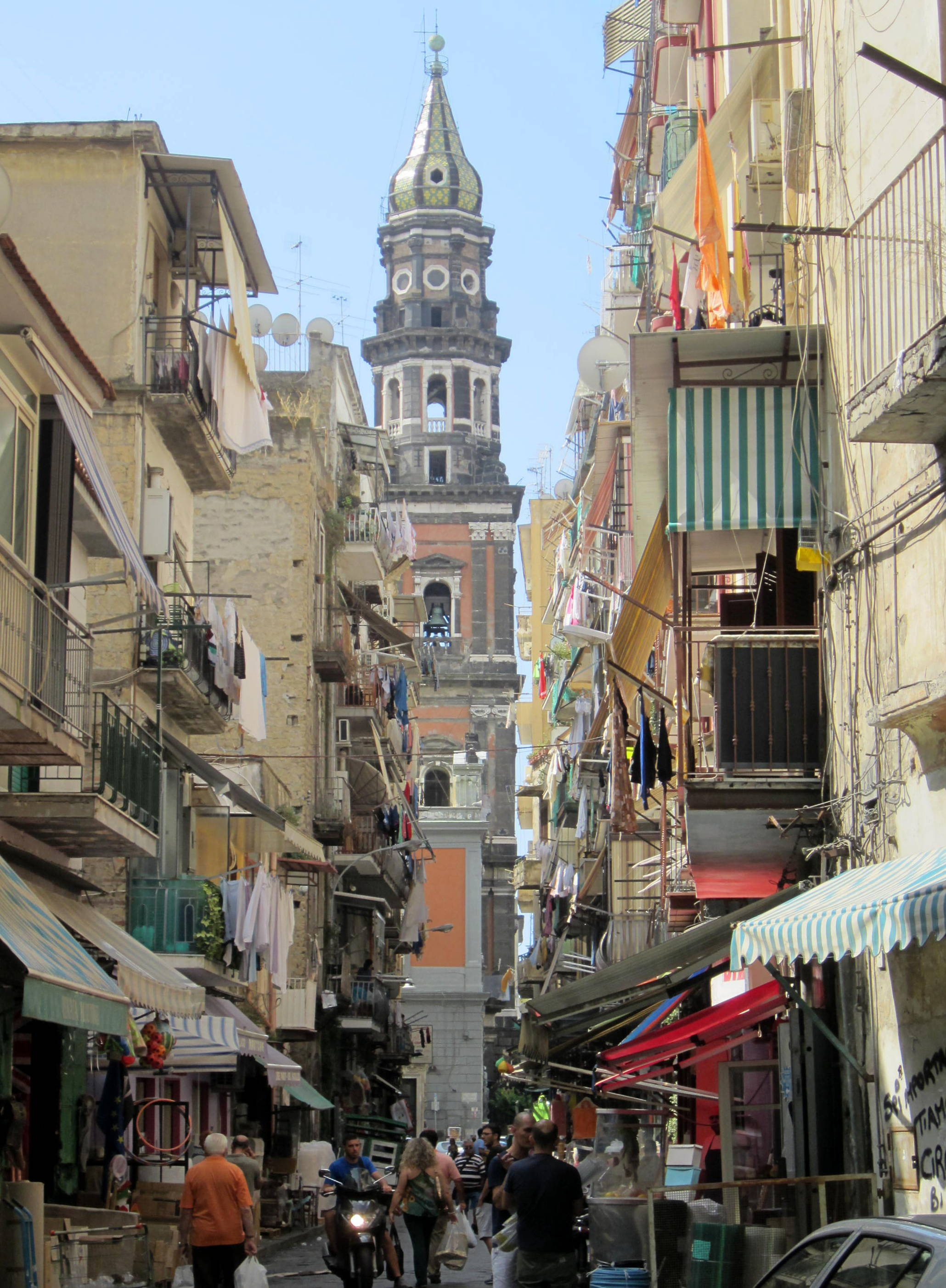 Campanile di Santa Maria del Carmine Maggiore visto da Via Lavinaio